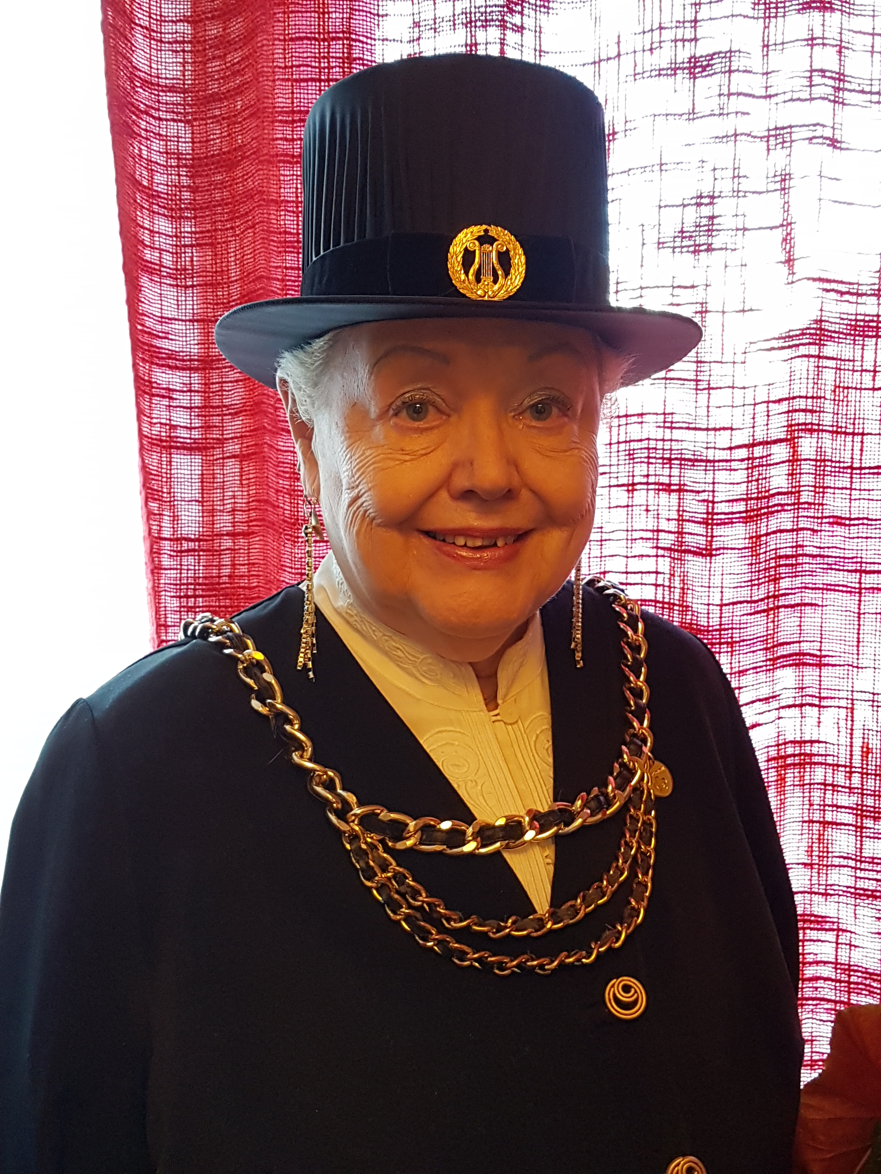 Päivikki Antolan tohtorikuva 40 vuotta väitöksen jälkeen kotonaan Tampereella toukokuussa 2016 poikani Kimmo Suojasen kuvaamana.